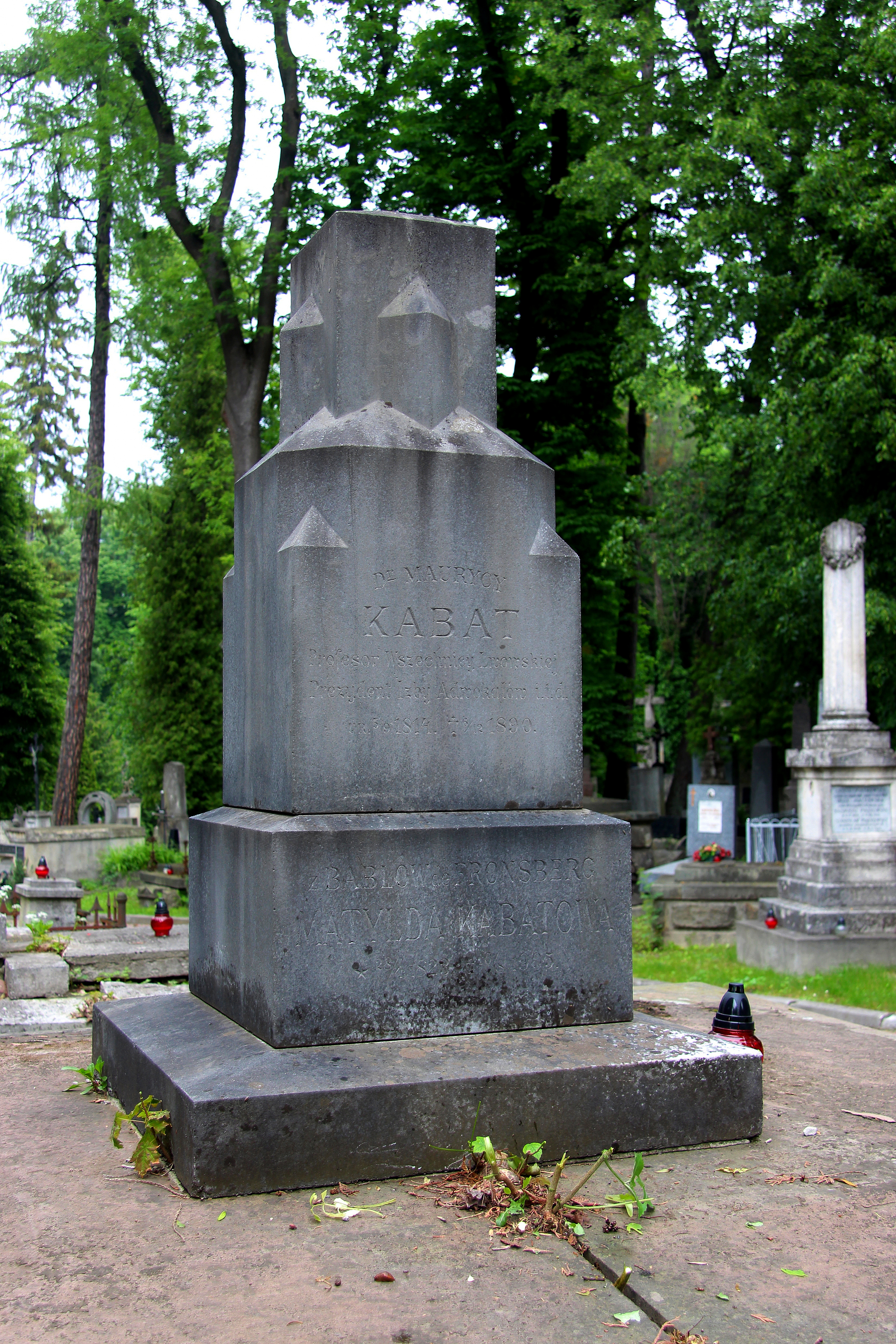 Гробівець Кабатів та Чеховичів. Личаківський цвинтар , 69 поле.